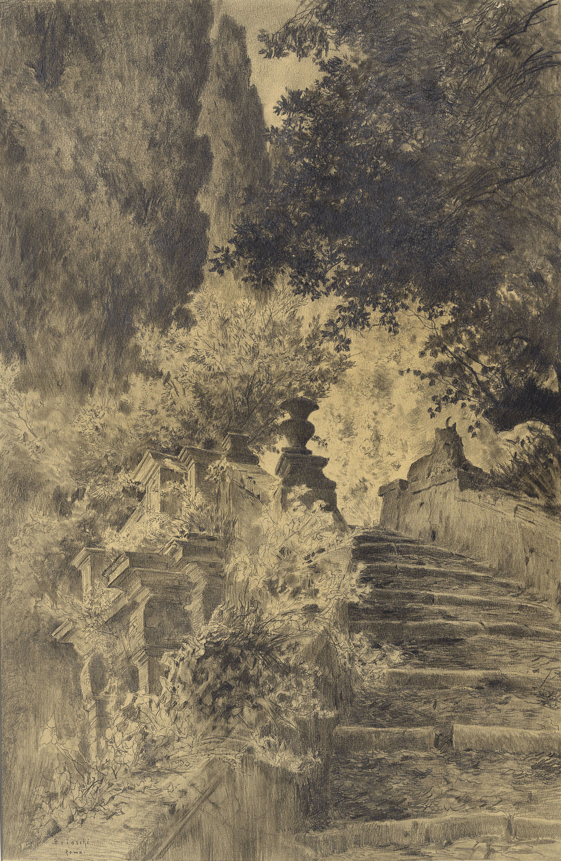 Othmar Brioschi: Treppenaufgang im Park der Villa d’Este in Tivoli. Bleistift auf Papier, 50 x 33,5 cm, links unten signiert und bezeichnet: „Brioschi Roma.“